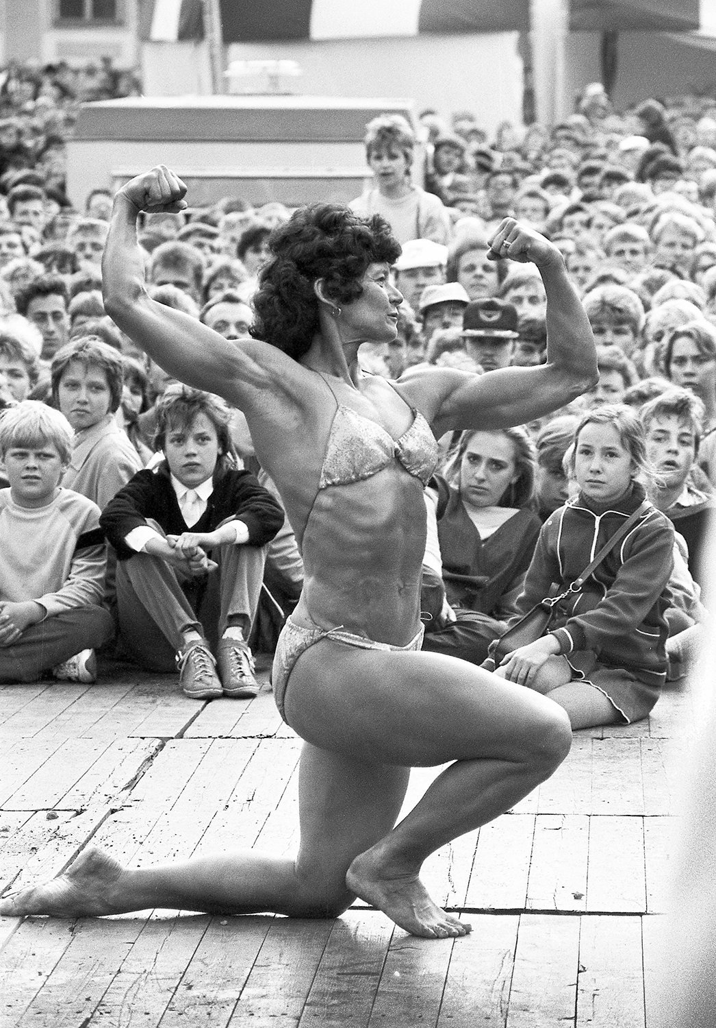 Merike Madar - Eesti esimene naiskulturist 87 (3)